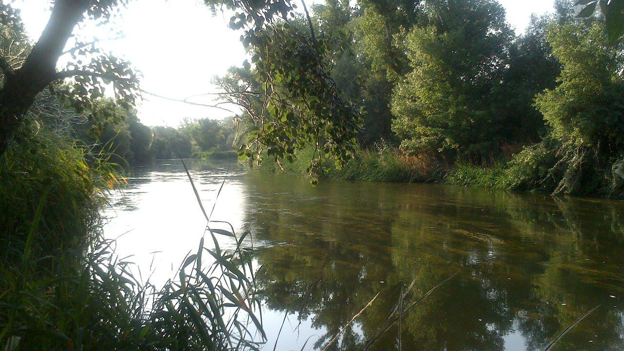 El río Jarama a su paso por el límite sur de San Fernando en la finca de La Guindalera antes de confluir con el río Henares.